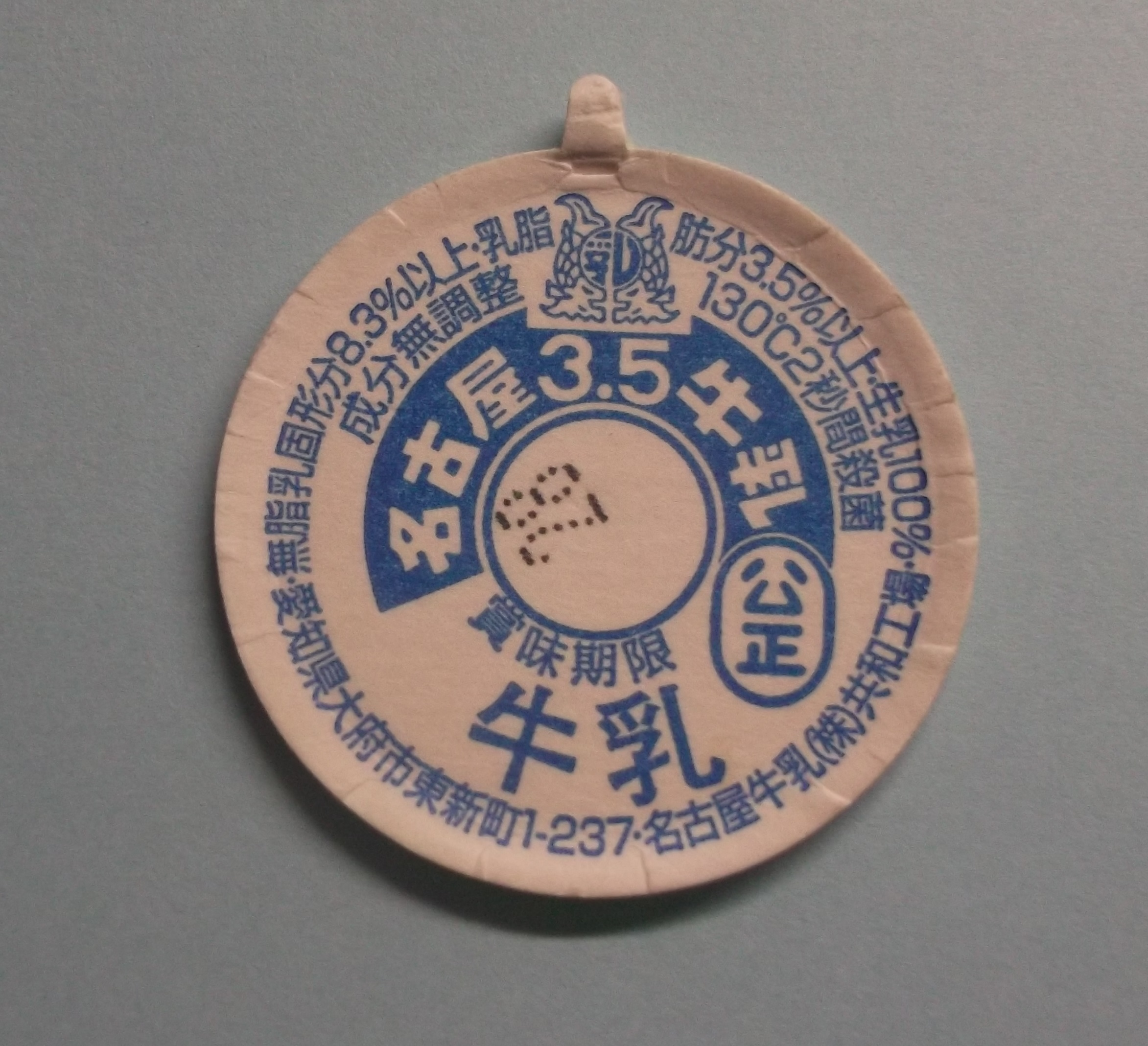 名古屋牛乳の牛乳キャップ。個人蔵。